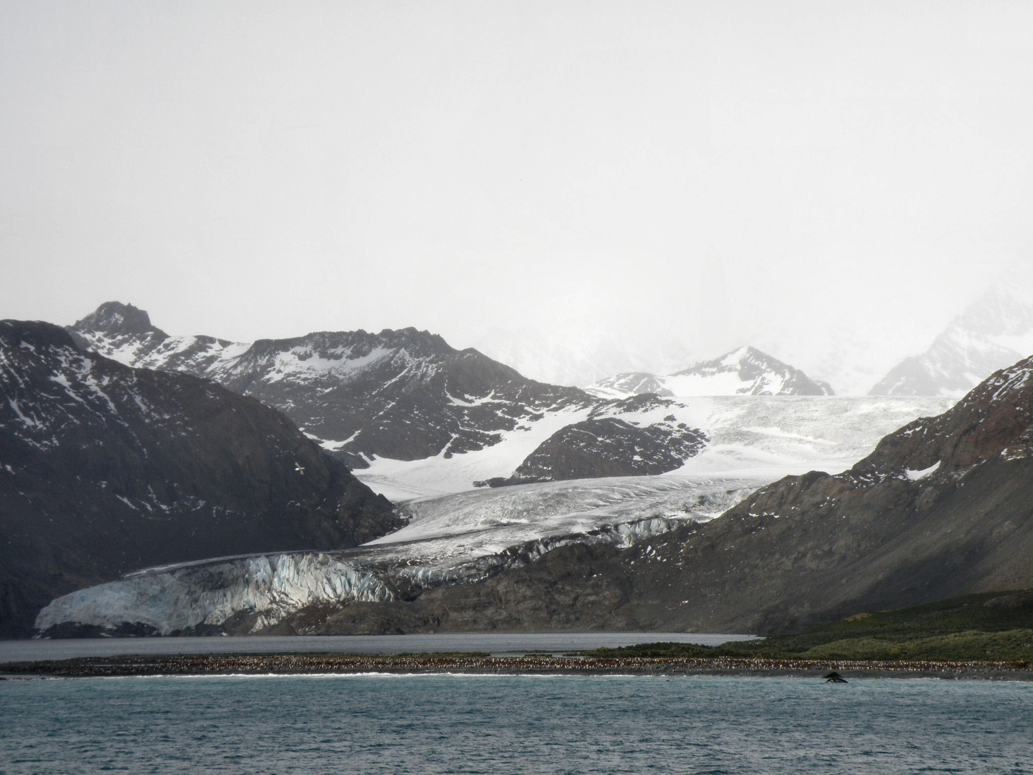 Géorgie du Sud - Gold Harbour et le glacier Bertrab